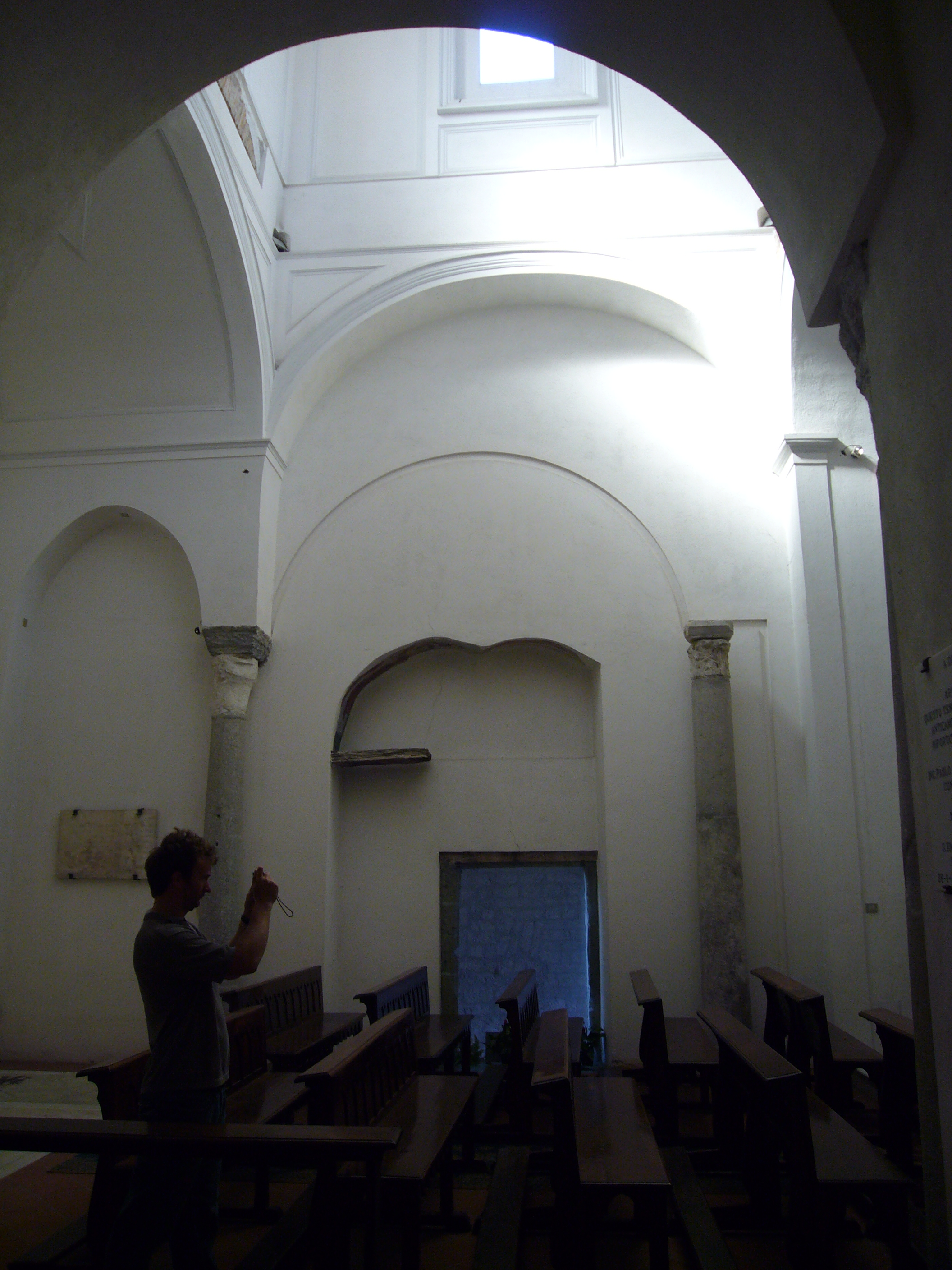 Napoli, Castel dell'Ovo: chiesa del Salvatore interno